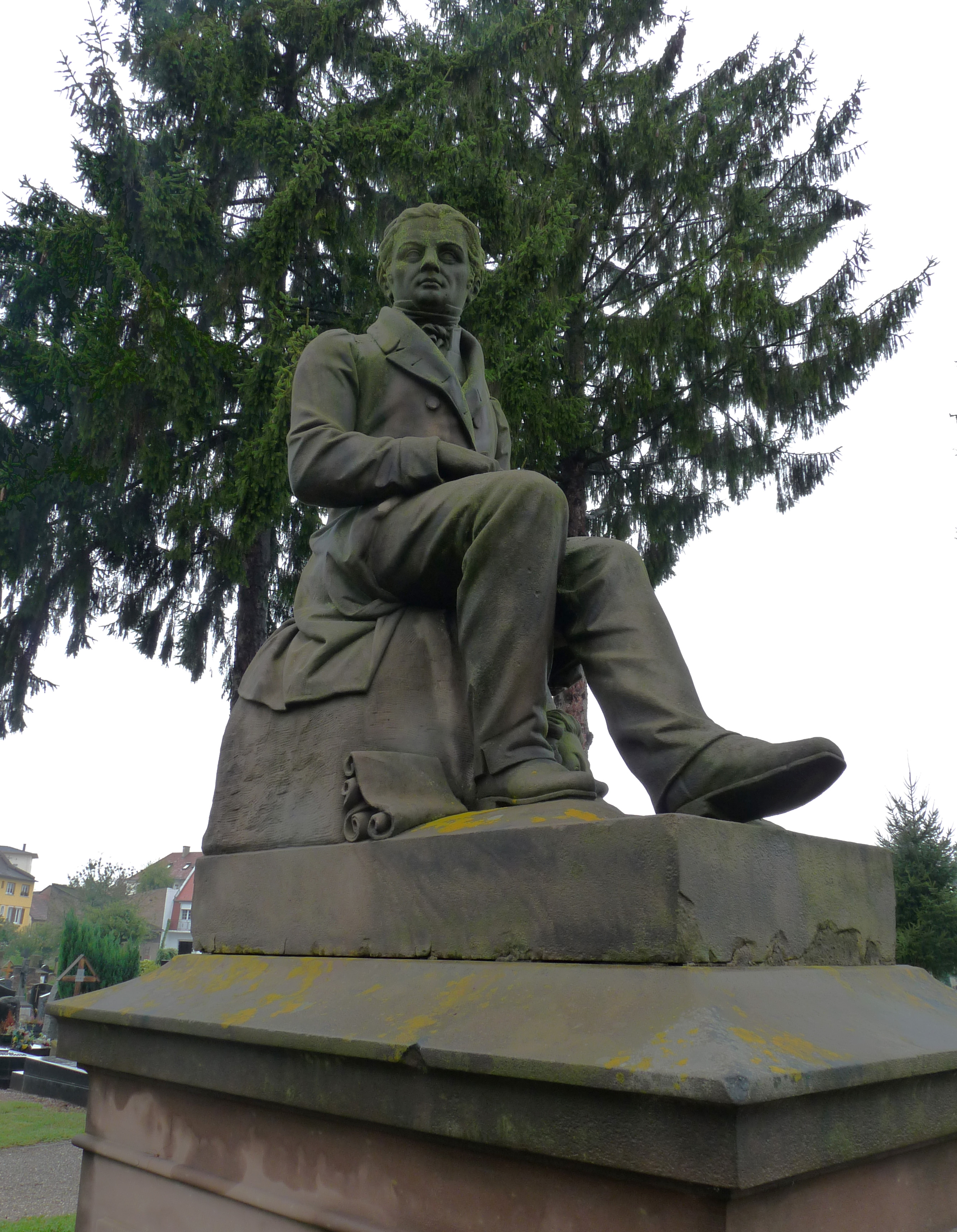 Monument à Jean Georges Daniel Arnold sculpté par André Friedrich. Cimetière Saint-Gall de Strasbourg